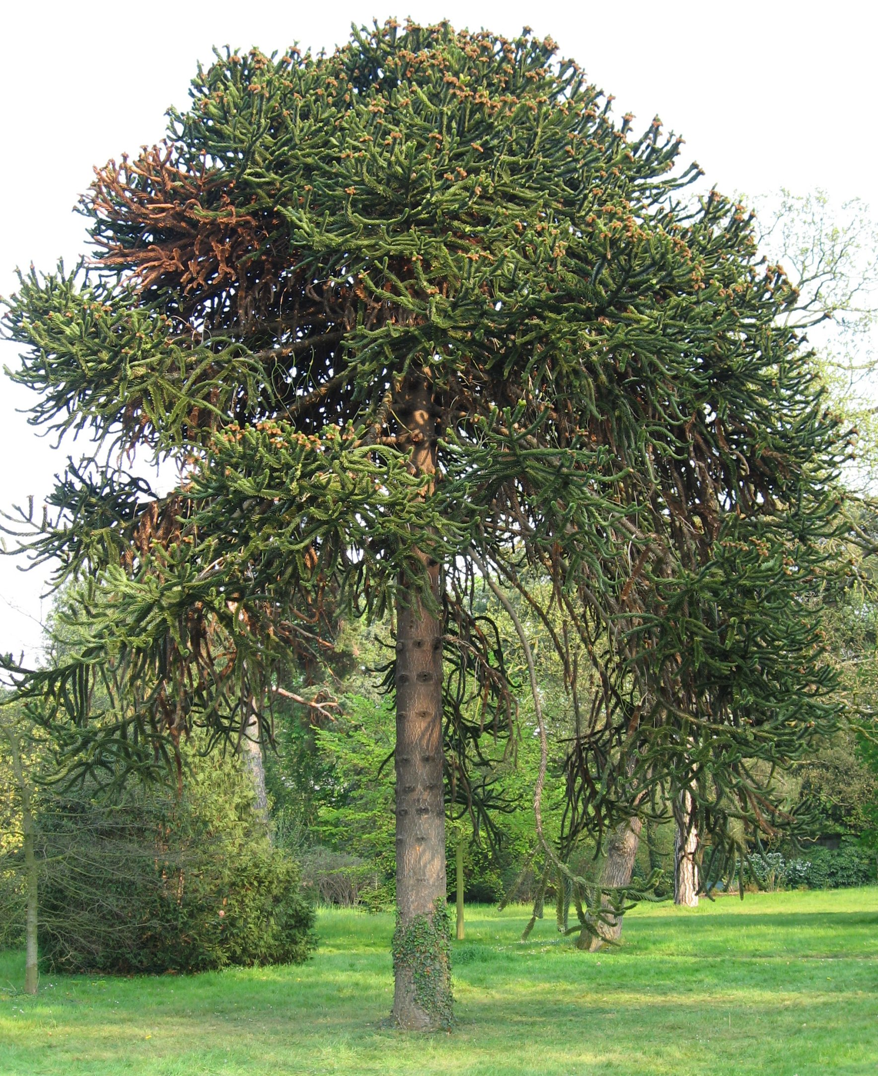 Araucaria araucana (Désespoir des singes)(10m high)(planted in 1907) in Parc de Bagatelle Map: 48° 52' 17" N 2° 14' 50" E